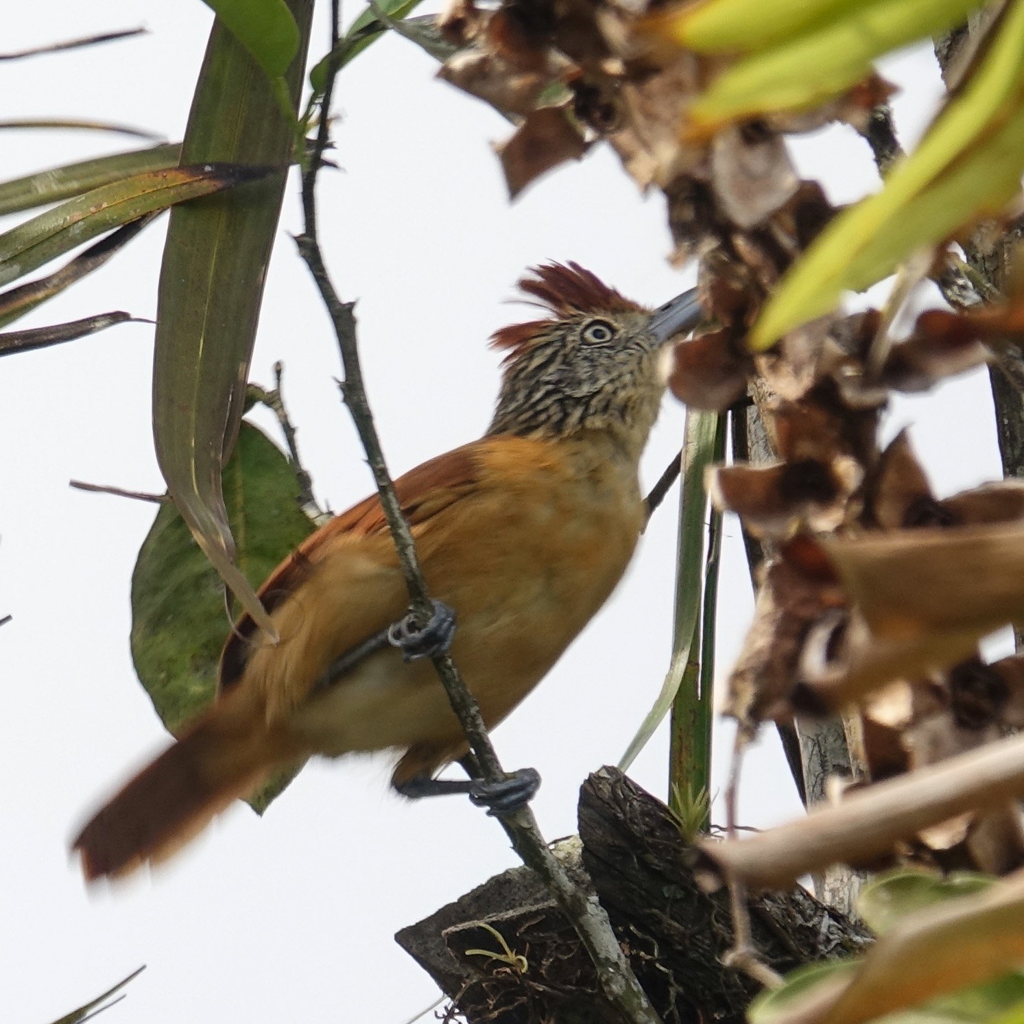 Barred Antshrike (female)